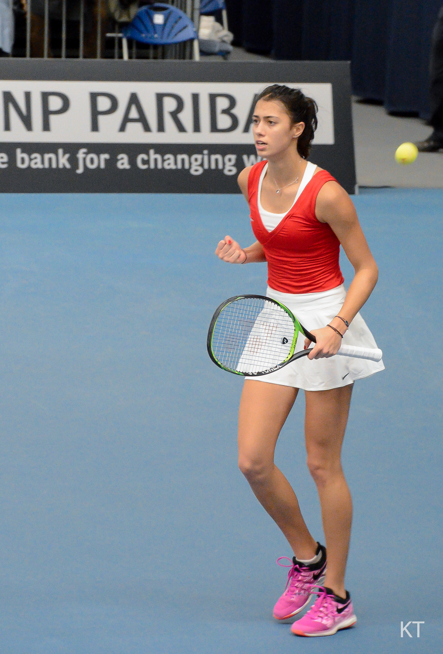 Olga Danilovic